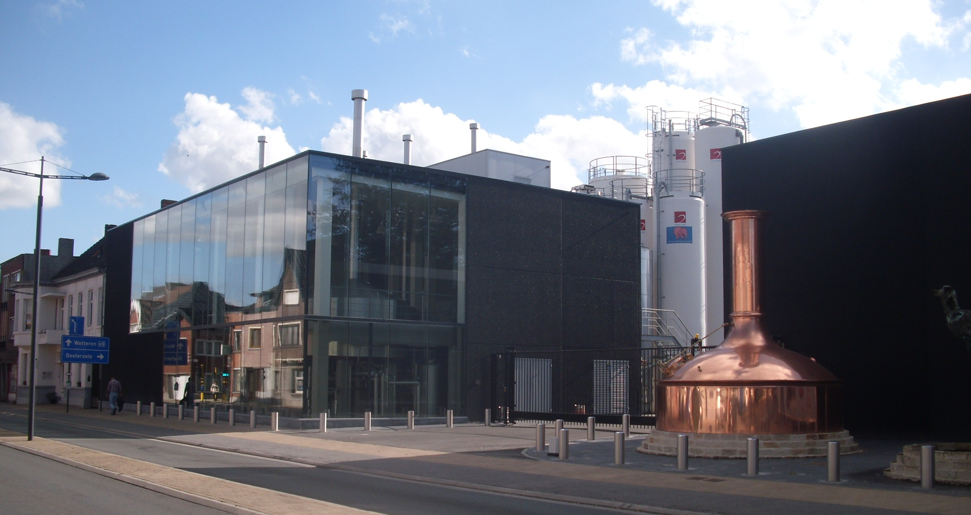 Brouwzaal van Brouwerij Huyghe - Brussesesteenweg - Melle - Oost-Vlaanderen - België